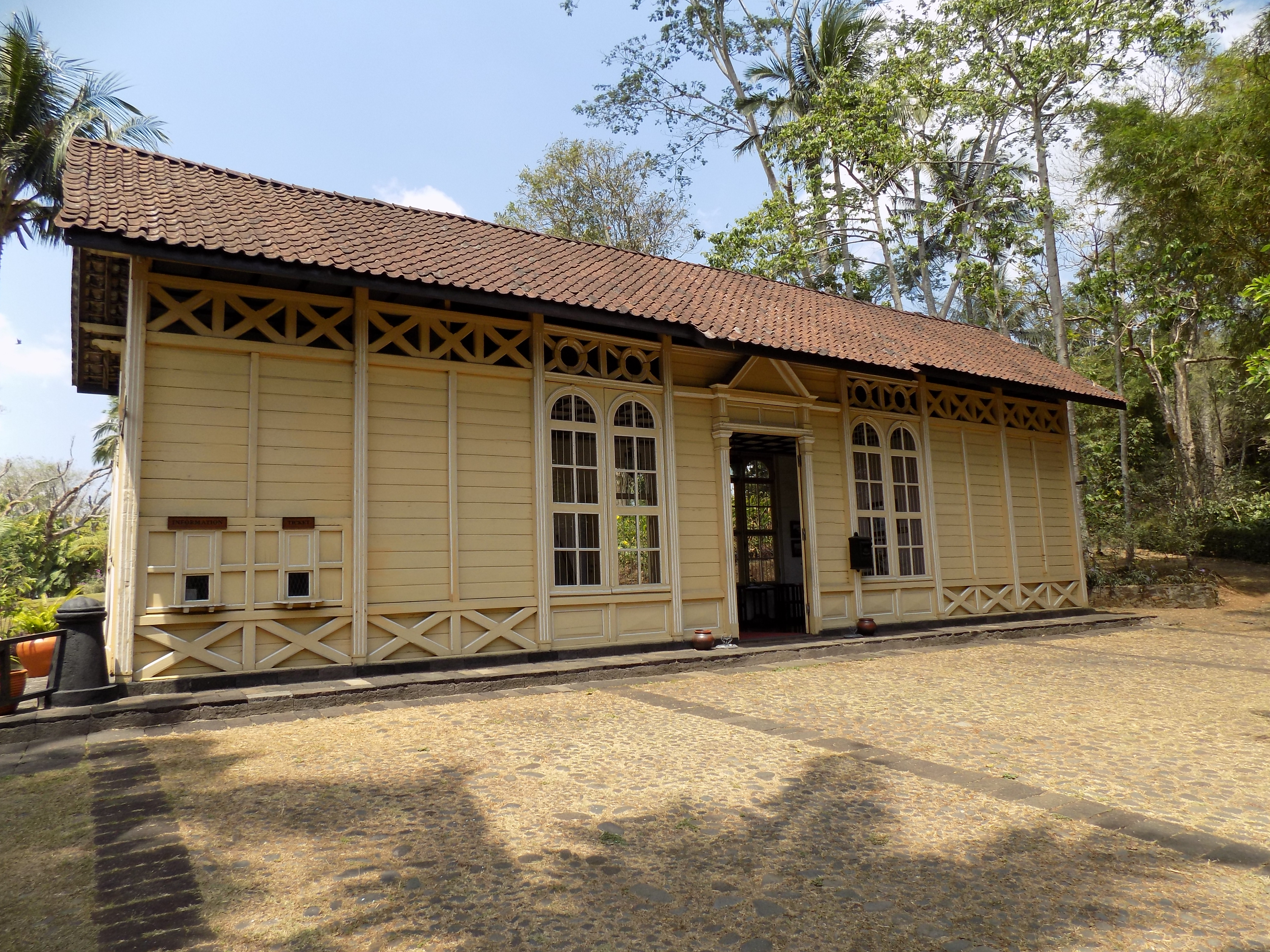 Stasiun Mayong yang telah menjadi loby hotel Messa Stila